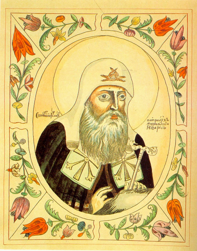 Гермоген — патриарх Московский и всея Руси. Фототипия. 1905